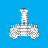 Прапор Хмільника